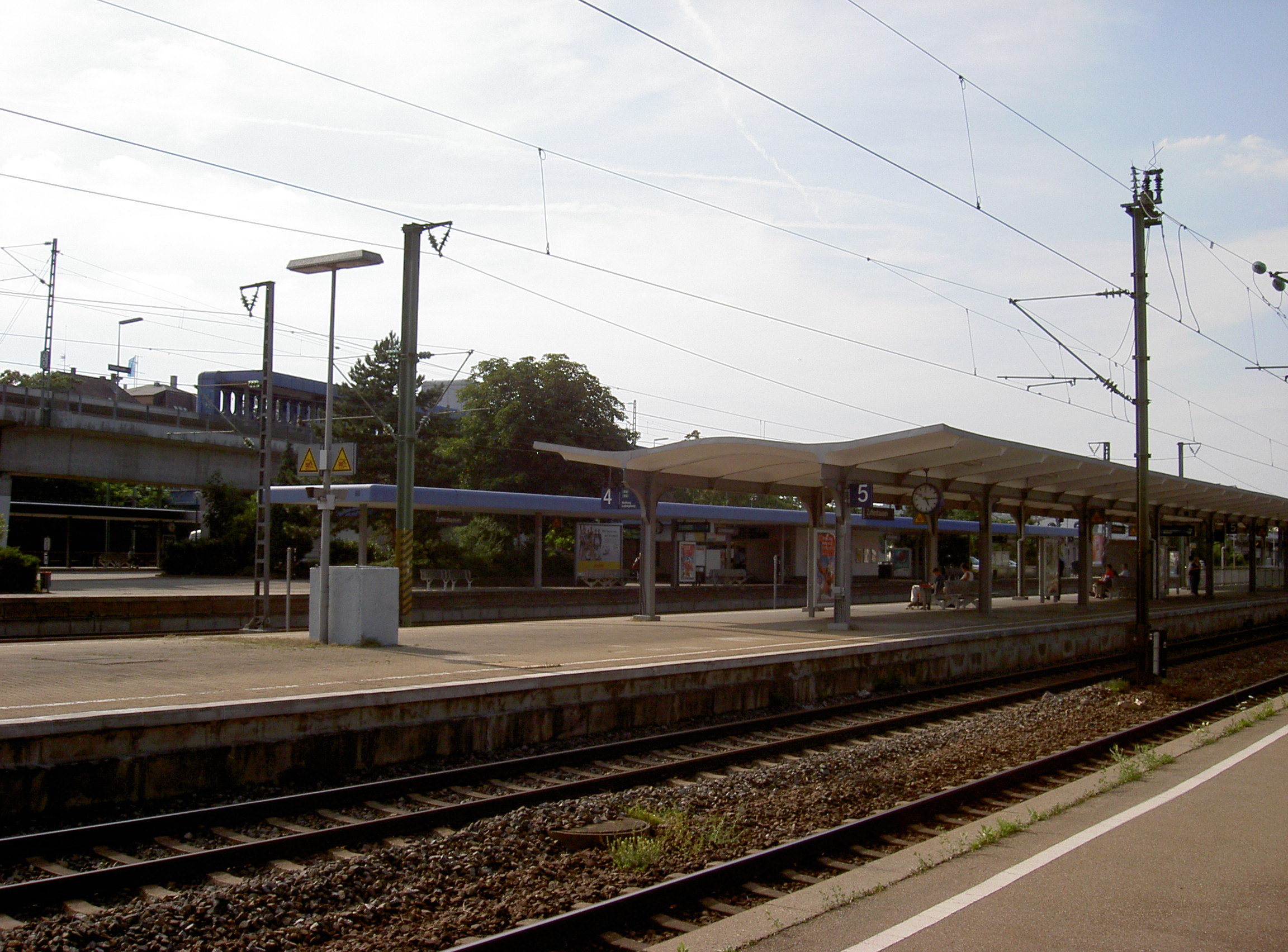 Bahnhof Zuffenhausen